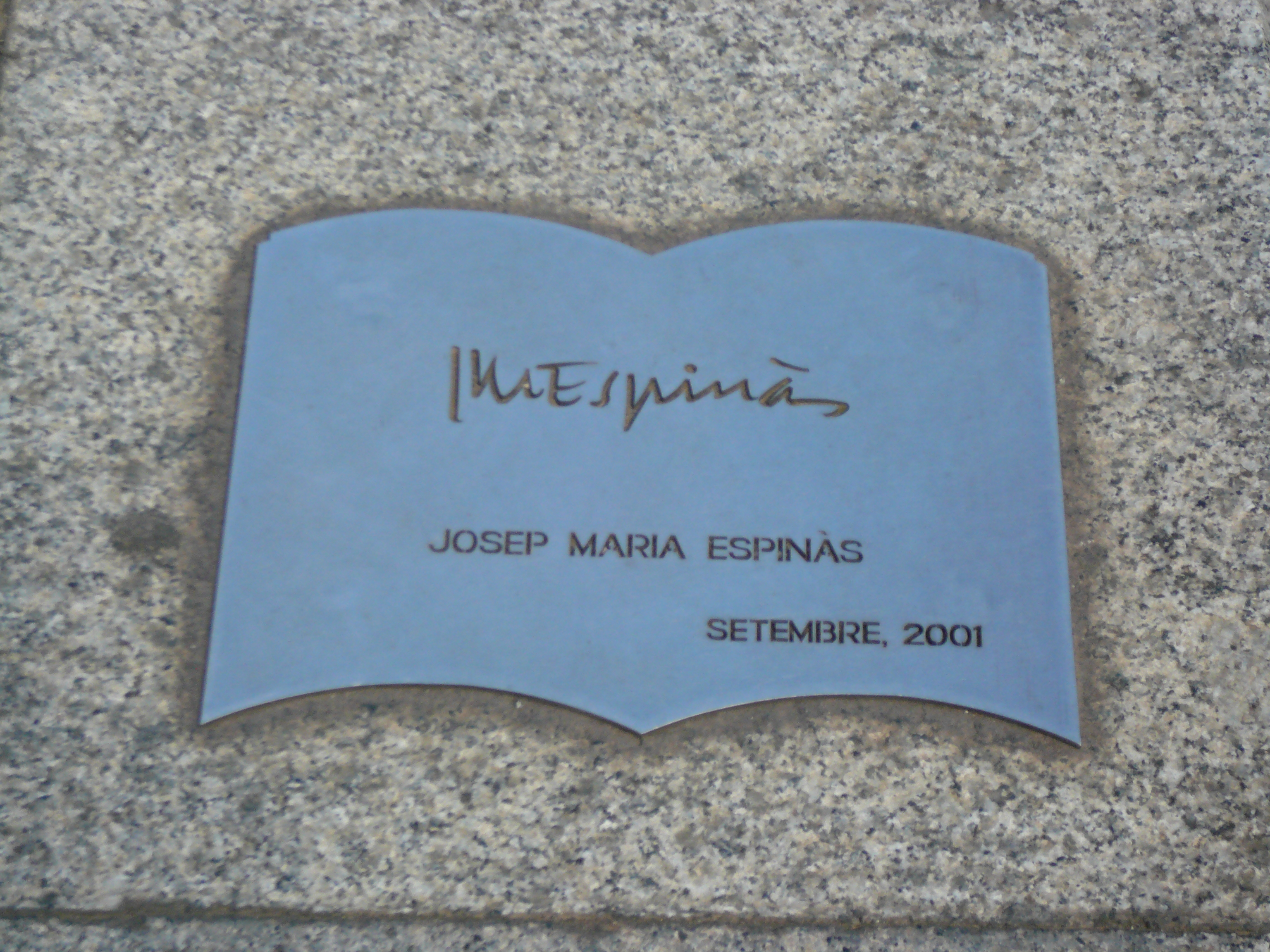 Monument al Llibre, Saltamartí. Gran Via de les Corts Catalanes amb pg. de Gràcia (Barcelona). Escultor: Joan Brossa, signada, amb la col·laboració de Josep Pla-Narbona. Material: planxa pintada d'acer inoxidable -originalment d'acer- sobre base d'acer inoxidable i de granit gris. 1994. 34″ N, 2° 10′ 05.05″ E